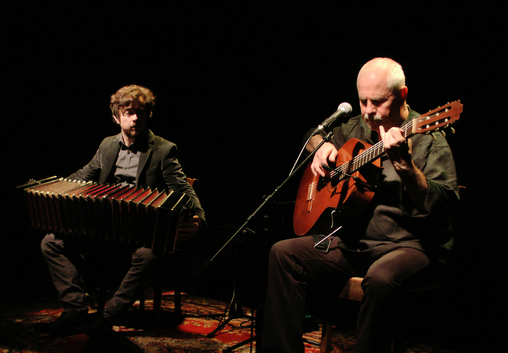 Paul Dirmeikis & Jean-Baptiste Henry en concert - mars 2019